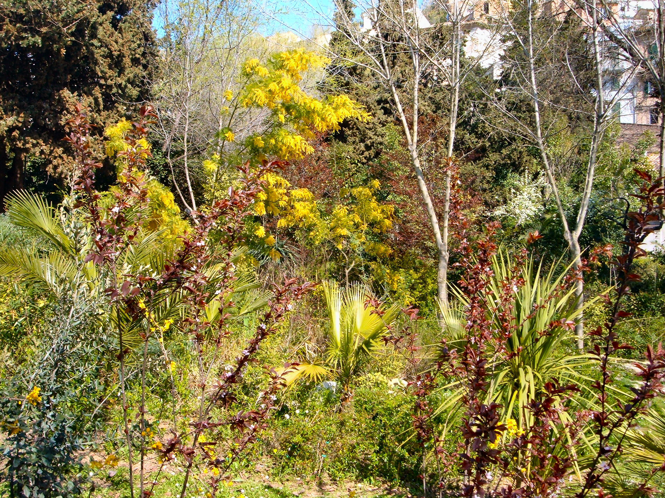 Autore: Villa dei Ligustri Fonte: Villa dei Ligustri Descrizione: Immagine del giardino in primavera